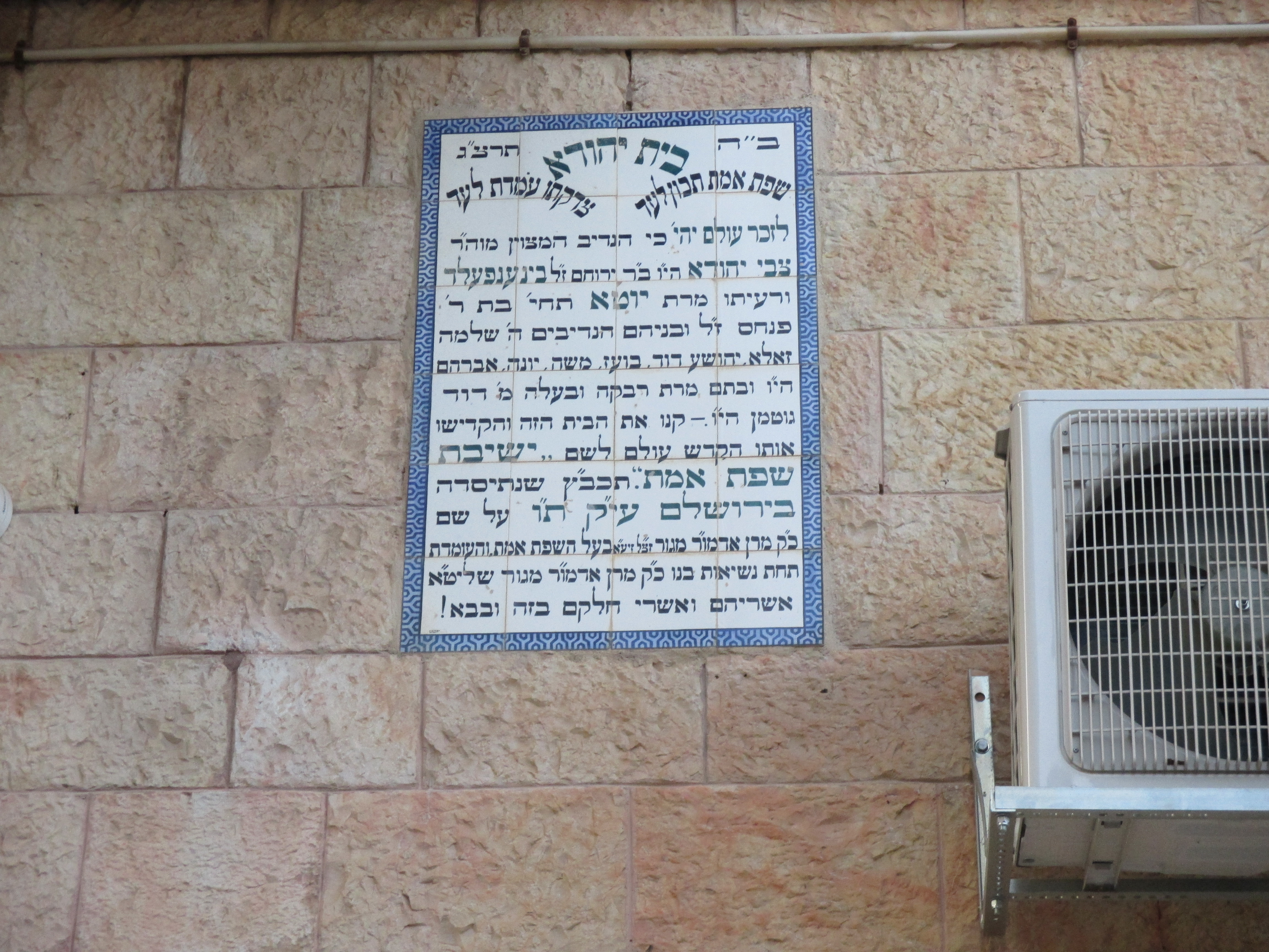 שלט הנצחה ישיבת שפת אמת